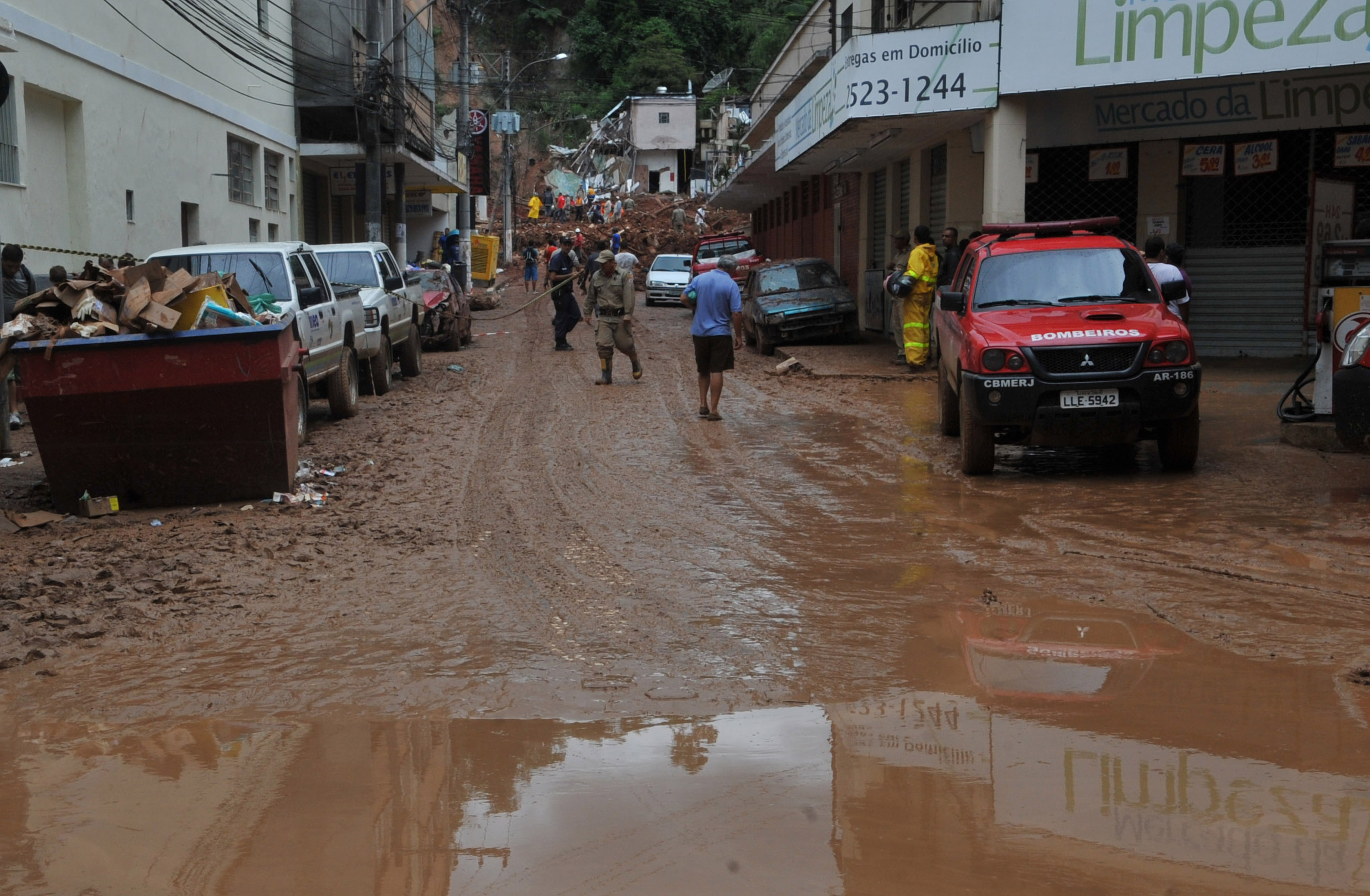 Nova Friburgo (RJ) - Áreas atingidas pelas chuvas, no município de Nova Friburgo, região serrana fluminense (Valter Campanato/ABr)